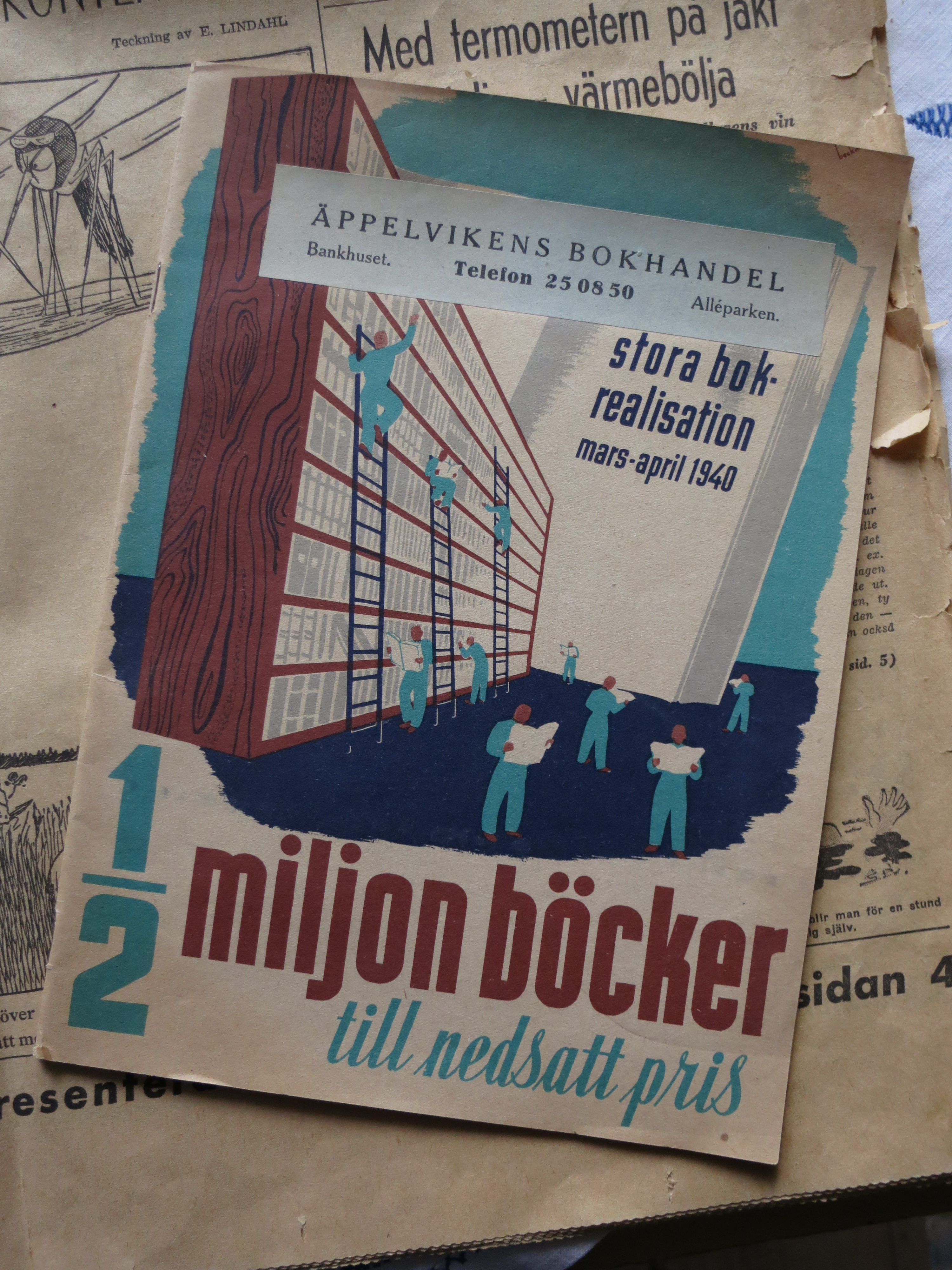 Den första gemensamma bokreakatalogen trycktes 1940